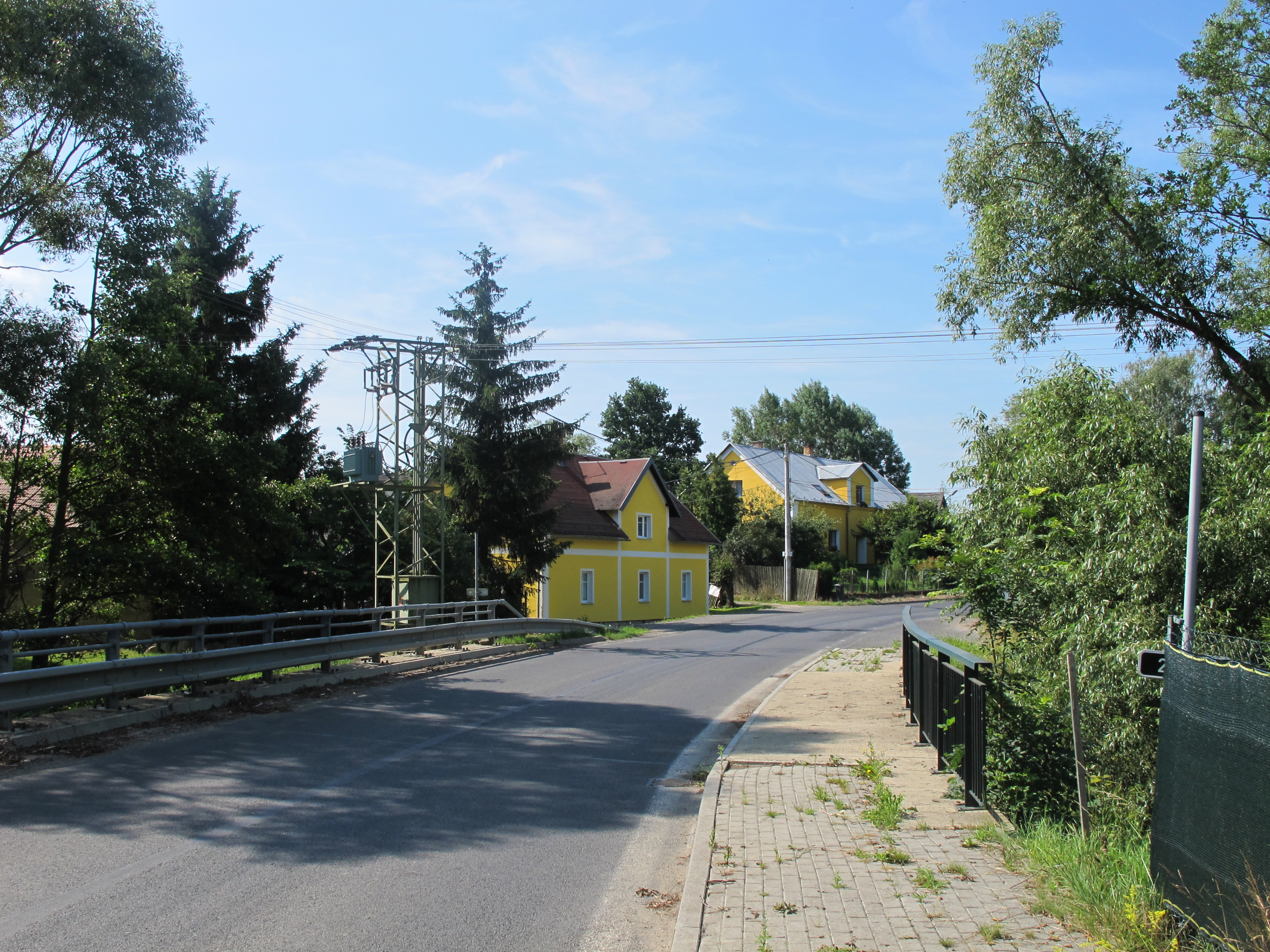 Hrzín (Nový Kostel), Straßenansicht